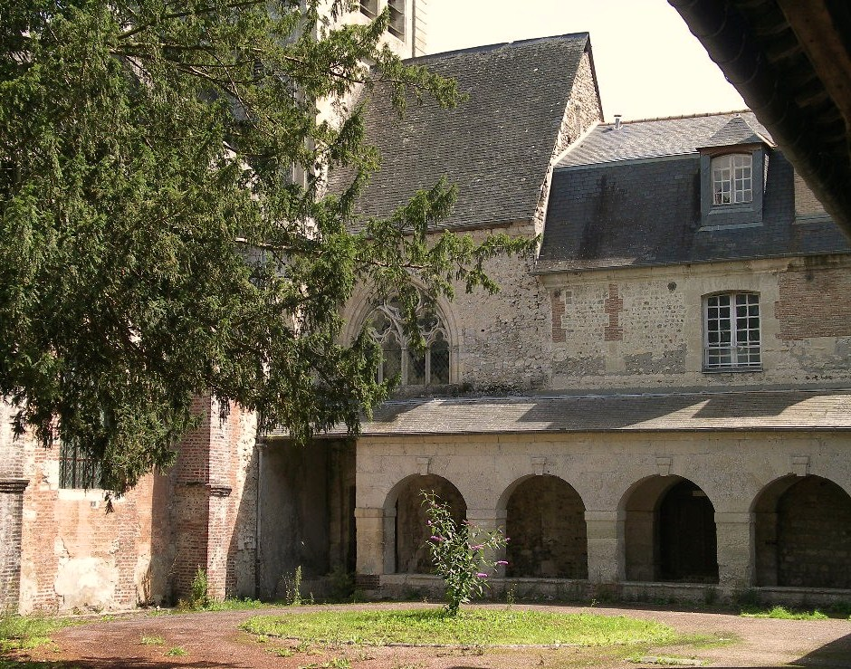 Cloître de l'ancien prieuré de Saint-Hymer (Calvados)